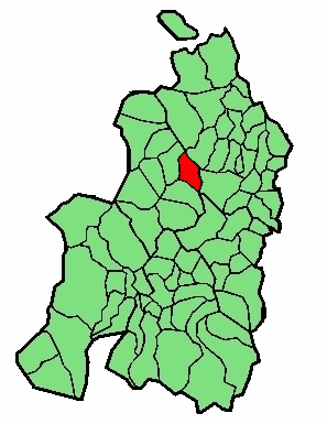 aipaturiko udalerriaren kokapena Nafarroa Beherean